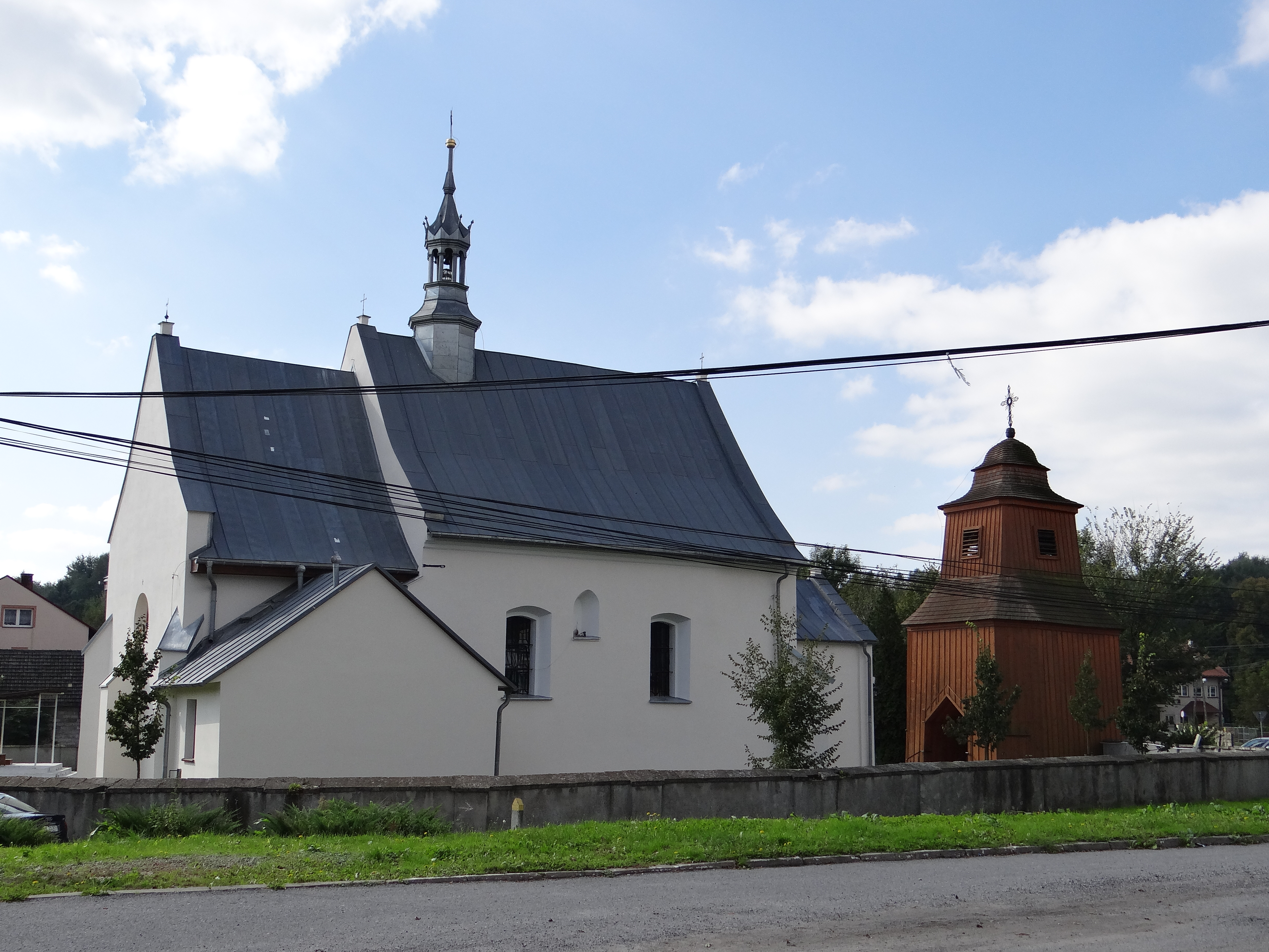 Sieciechowice, zespół kościoła par. pw. św. Andrzeja, XIV, XVIII